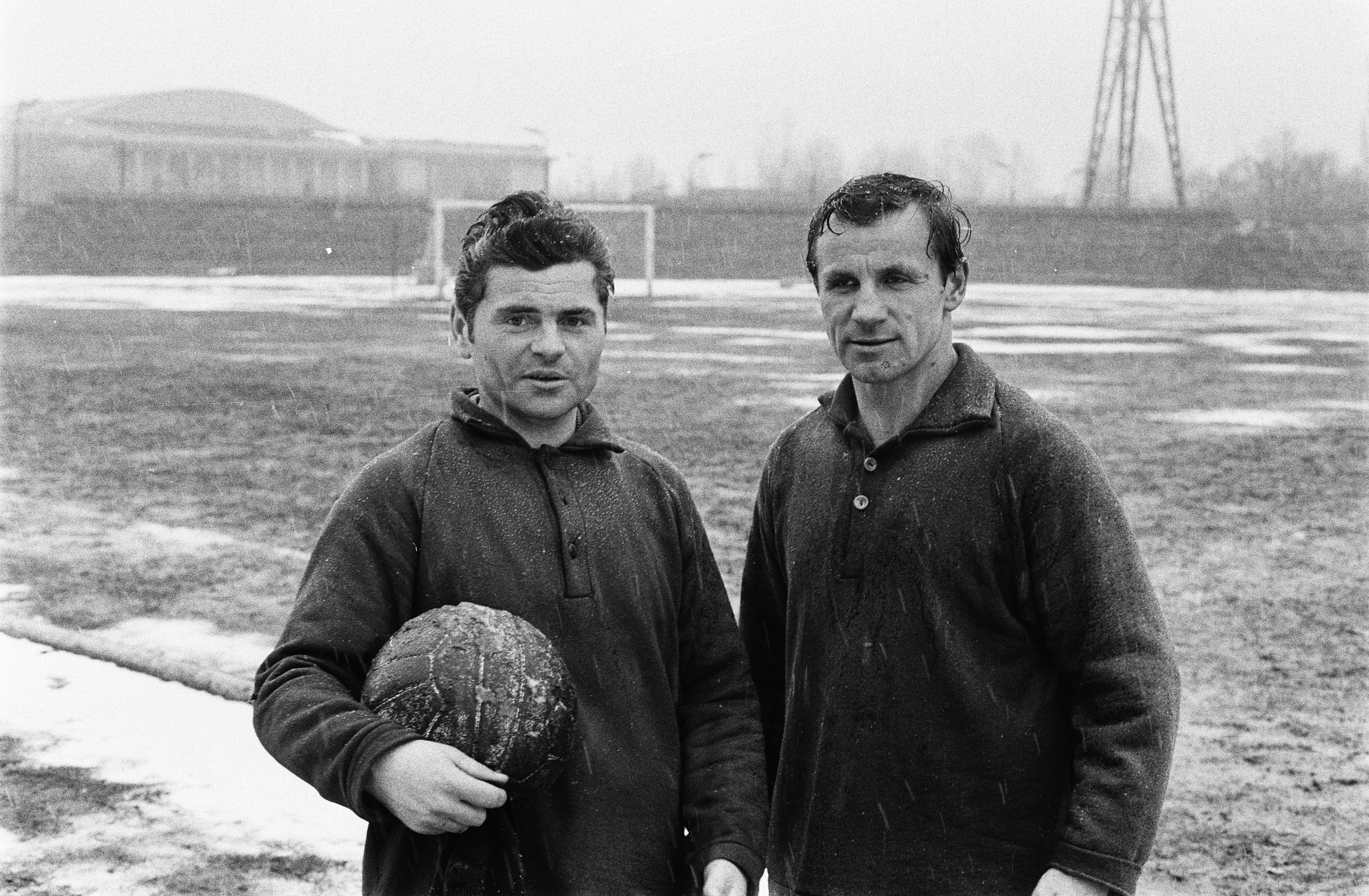 Collectie / Archief : Fotocollectie Anefo Reportage / Serie : [ onbekend ] Beschrijving : Legia-elftal traint in Warschau (Polen) Datum : 1 april 1970 Locatie : Polen, Warschau Trefwoorden : sport, voetbal Fotograaf : Evers, Joost / Anefo Auteursrechthebbende : Nationaal Archief Materiaalsoort : Negatief (zwart/wit) Nummer archiefinventaris : bekijk toegang 2.24.01.05 Bestanddeelnummer : 923-4158